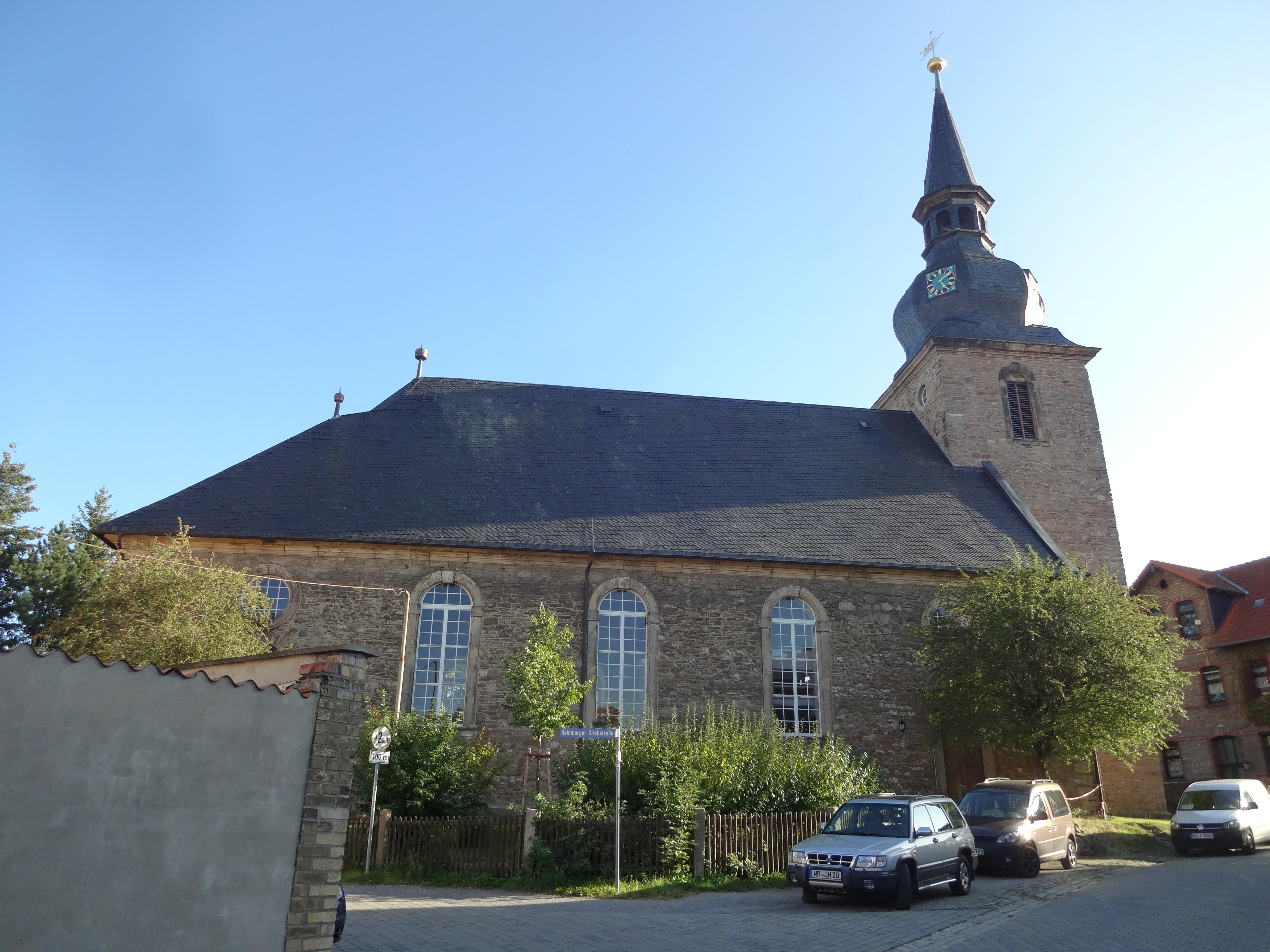 denkmalgeschützte Heilige-Dreifaltigkeitskirche in Heimburg